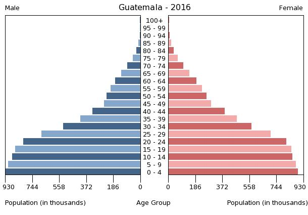 A population pyramid illustrates the age and sex structure of a country's population and may provide insights about political and social stability, as well as economic development. The population is distributed along the horizontal axis, with males shown on the left and females on the right. The male and female populations are broken down into 5-year age groups represented as horizontal bars along the vertical axis, with the youngest age groups at the bottom and the oldest at the top. The shape of the population pyramid gradually evolves over time based on fertility, mortality, and international migration trends.